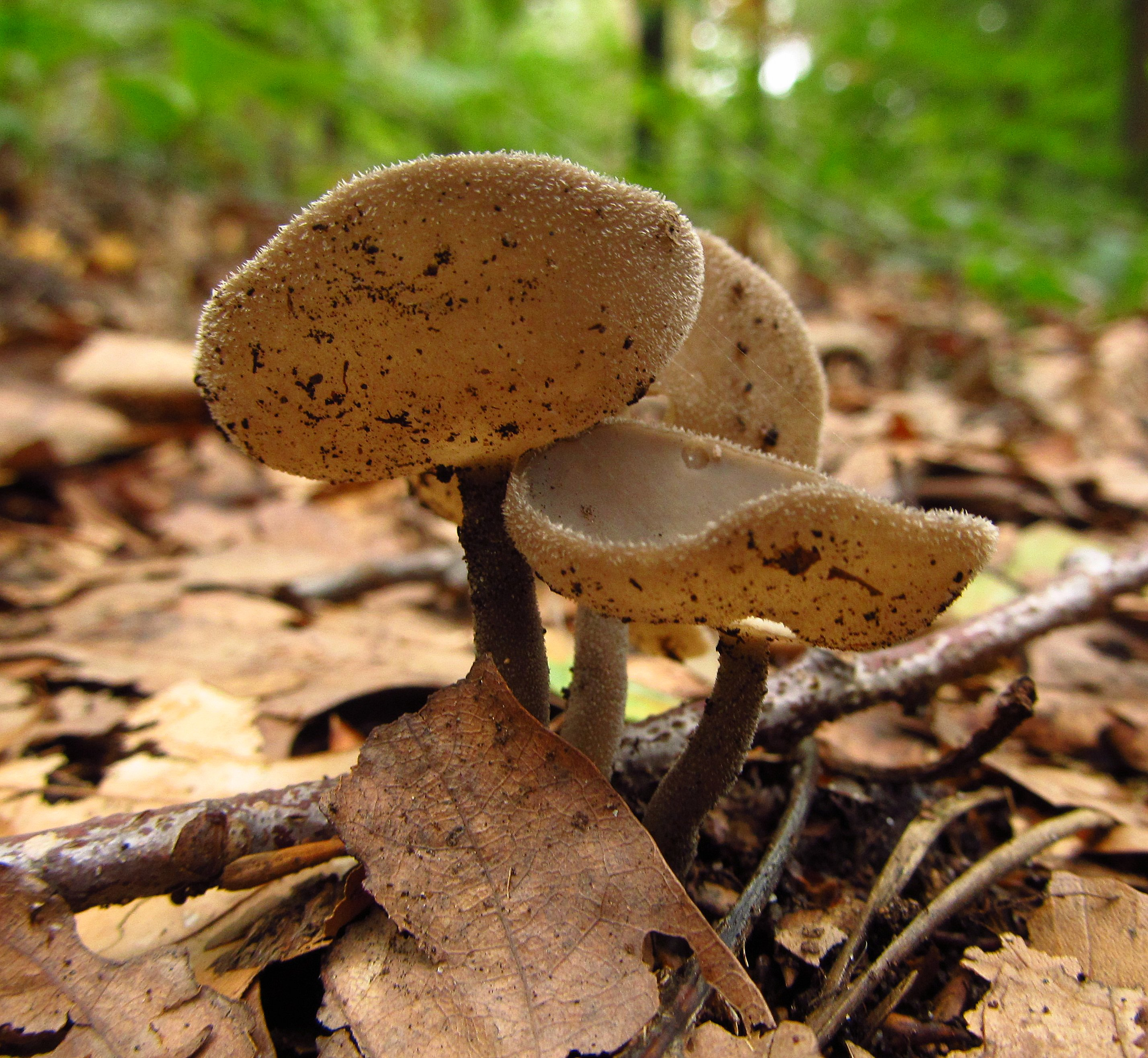 Langfuß-Lorchel (Helvella macropus) Klasse: Schlauchpilze (Ascomycetes) Ordnung: Pezizales Familie: Lorchelartige (Helvellaceae) Gattung: Lorcheln (Helvella)